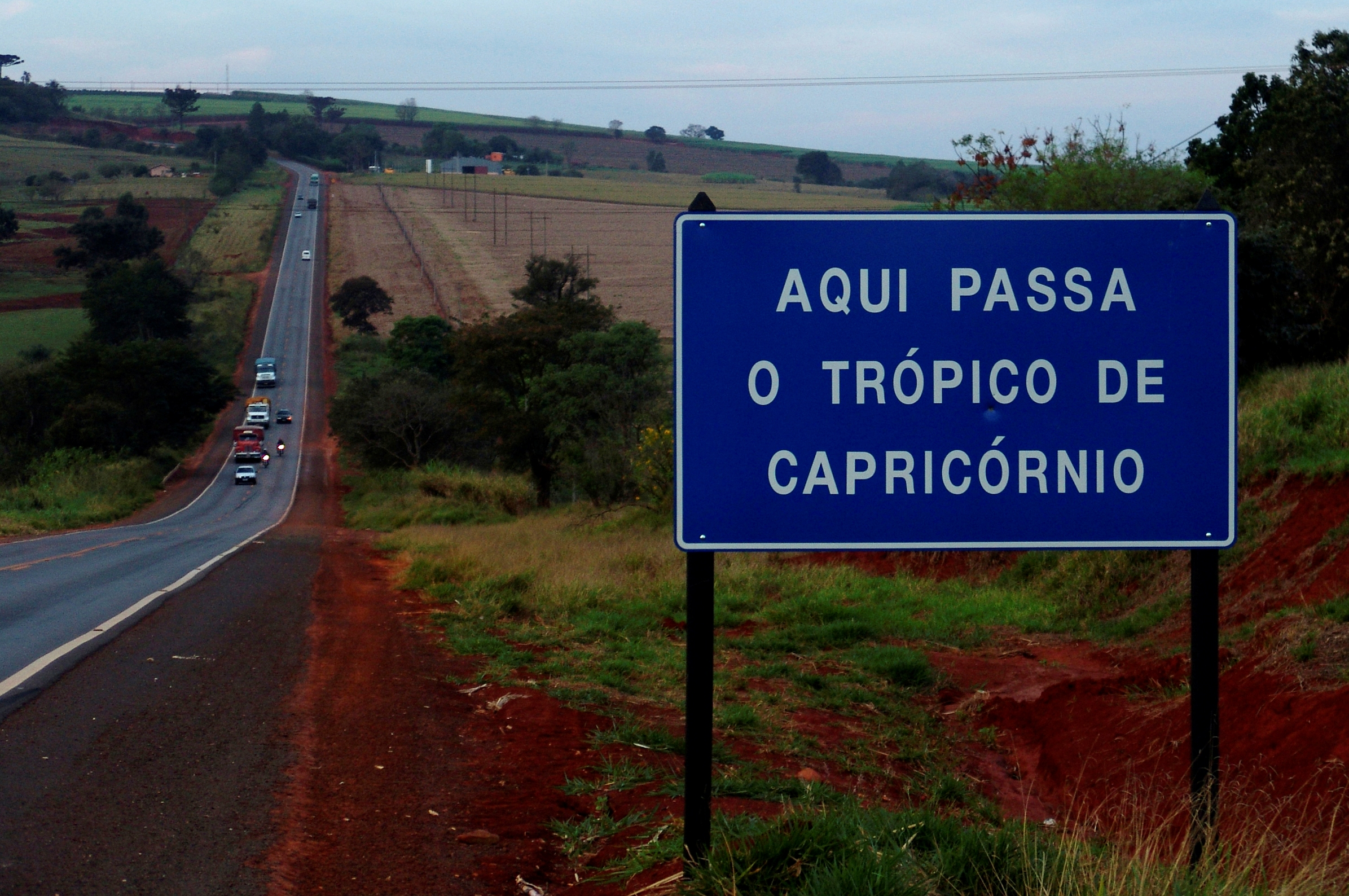 Placa rodoviária, do trópico de capricórnio na rodovia SP-255, Itaí, Brasil Long.: 49º07'21" Oeste (W)